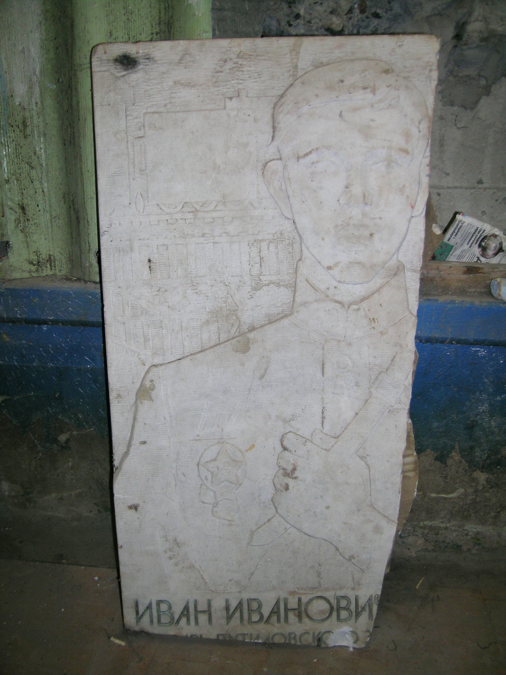 Фрагмент мемориальной доски Газа И. И., мемориальная доска, ул. Маршала Говорова, д. 18, (Профессиональный Лицей № 42) «Иван Иванович Газа (1894–1933) — слесарь Путиловского завода, активный участник Октябрьской революции и Гражданской войны, комиссар легендарного путиловского бронепоезда № 6 им. В. И. Ленина, руководитель краснопутиловской партийной организации, секретарь Ленинградского горкома партии. Окончил наше училище в 1909 году» (по данным сайта Электронная энциклопедия Санкт-Петербурга [1]), 1968 год, аритектор Васильковский В. С., скульптор Семченко А. В., материал — мрамор. Утрачена при реконструкции здания.